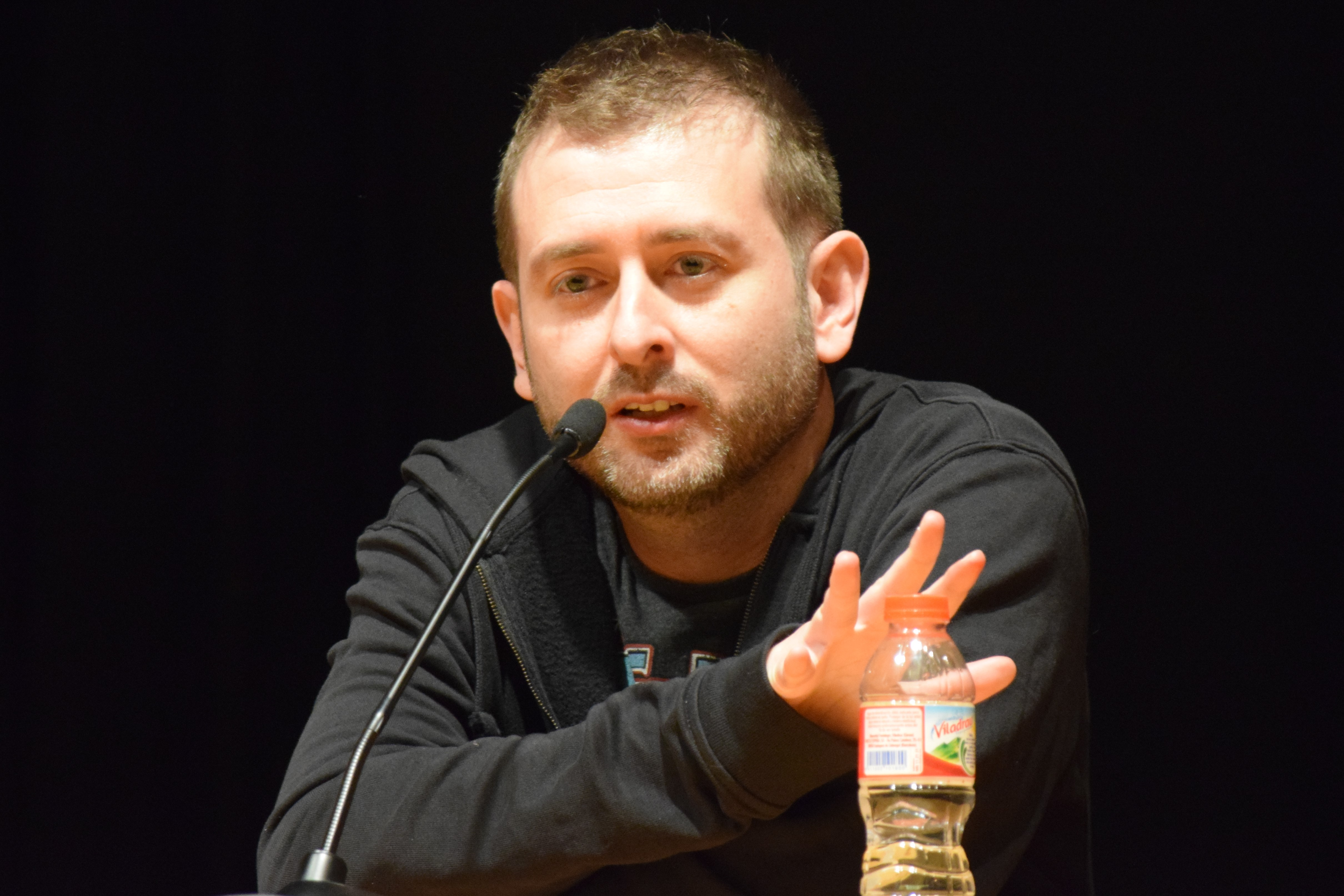 El dibuixant de còmic valencià Víctor Santos durant un acte al 37 Còmic Barcelona, 2019.